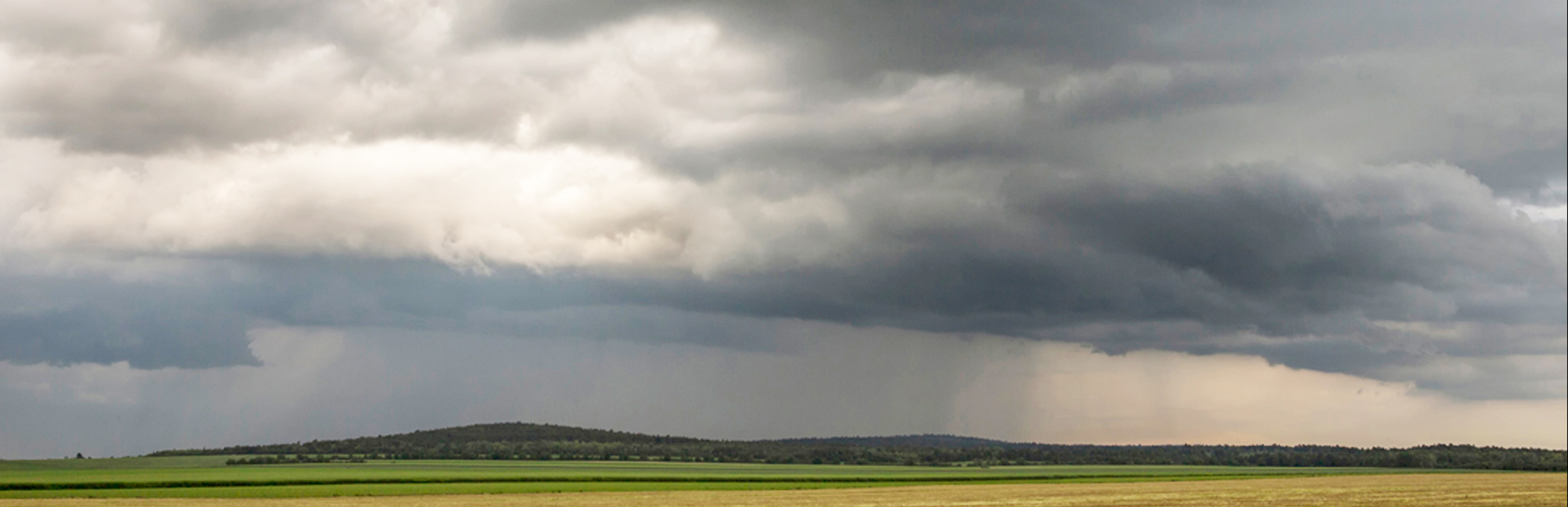 Vue d'une partie des Monts de Champagne